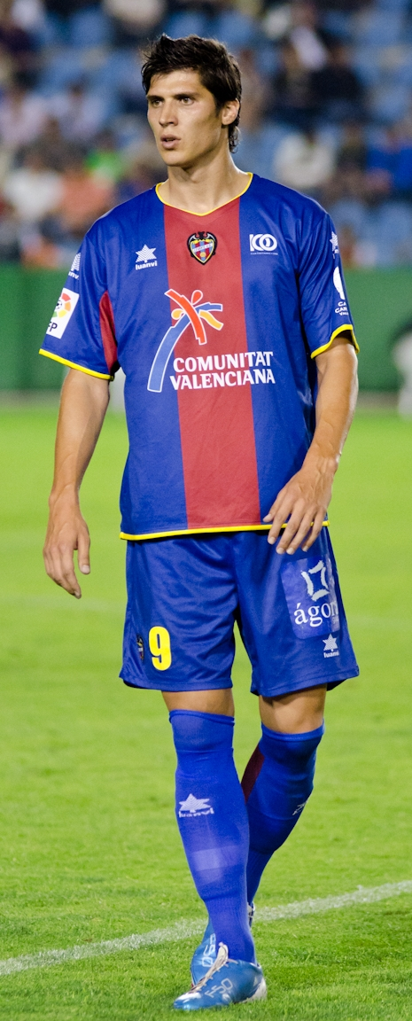 El jugador granota Rafa Jordà